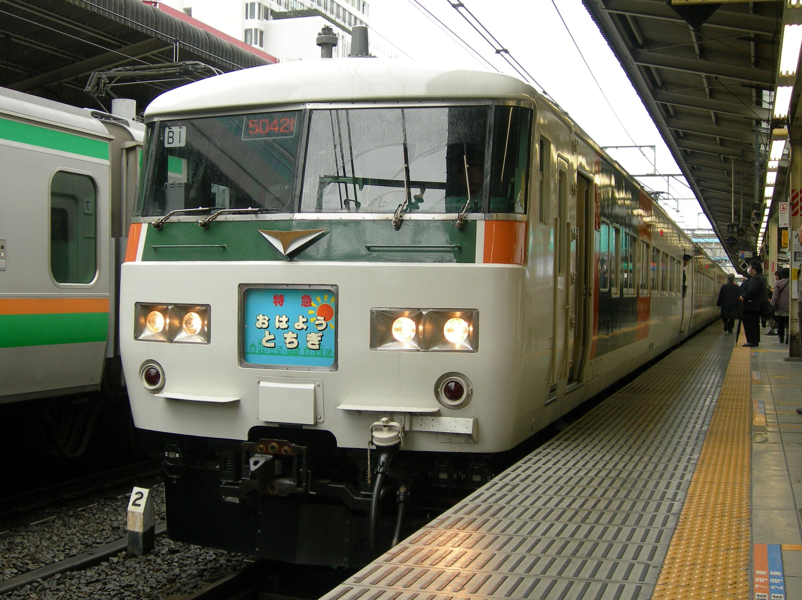 国鉄185系「おはようとちぎ」池袋駅で撮影